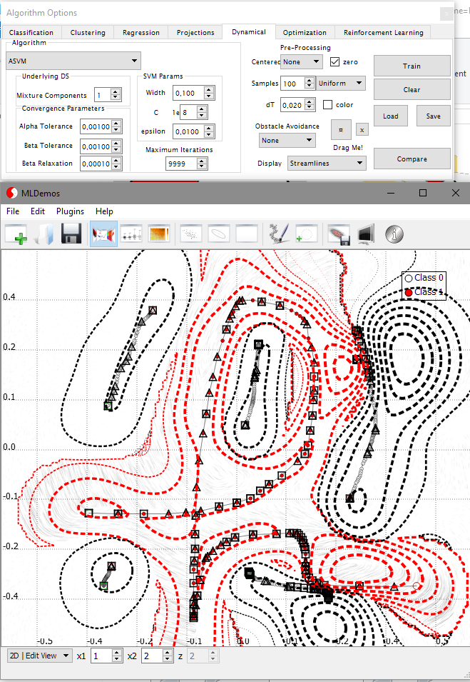 Par l'entraînement sur un grand nombre de mesures, il devient facile de reconnaître des formes, même complexes, et d'y classifier ensuite de nouveaux points